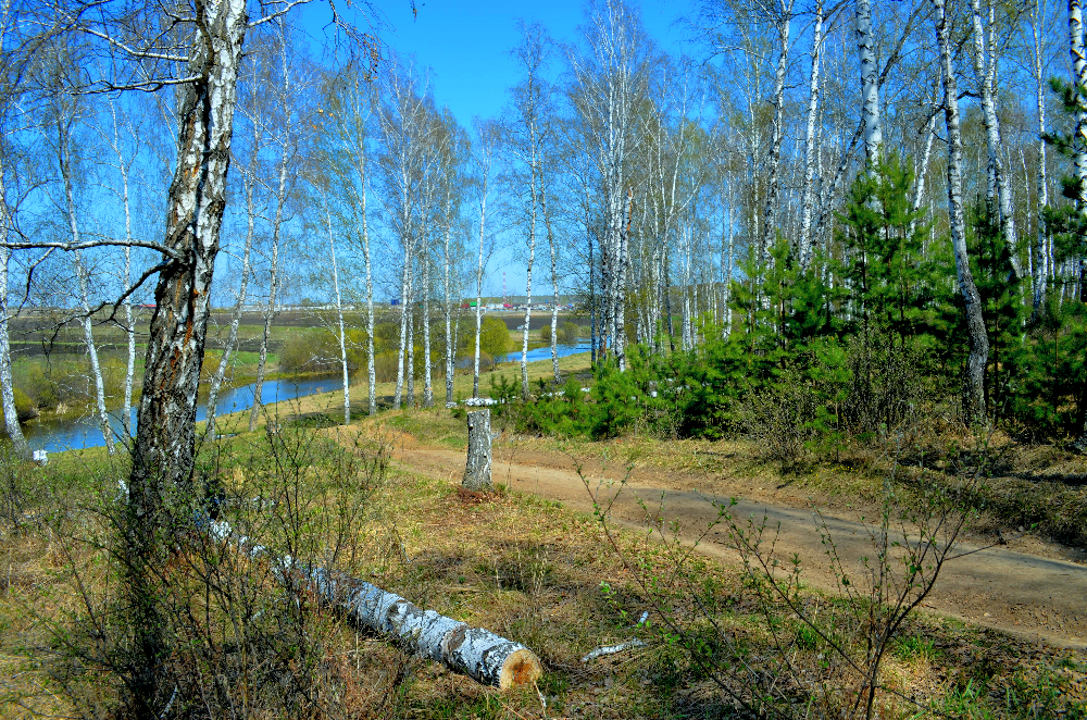 Ужовский бор: Ужовский бор расположен на правом берегу р. Зюзелки в ее нижнем течении между деревней Ужовка и поселками Светлый и Рощино,Сосновский район, Челябинская область This image is related to the protected area of Russia number 7410266